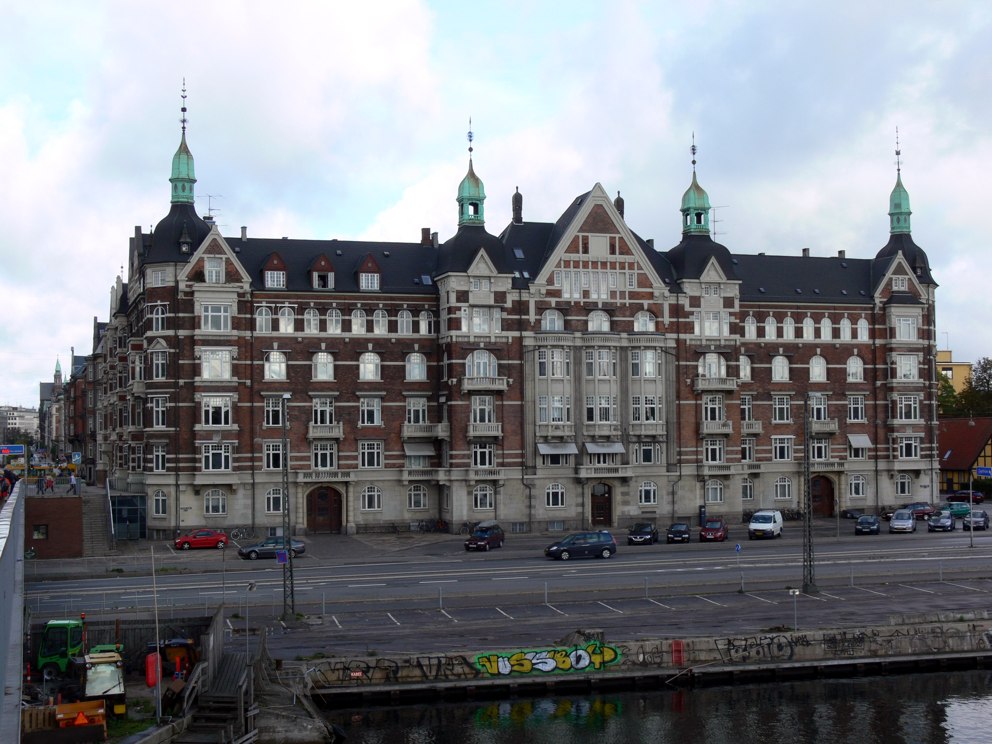 Christiansbrygge 30–34